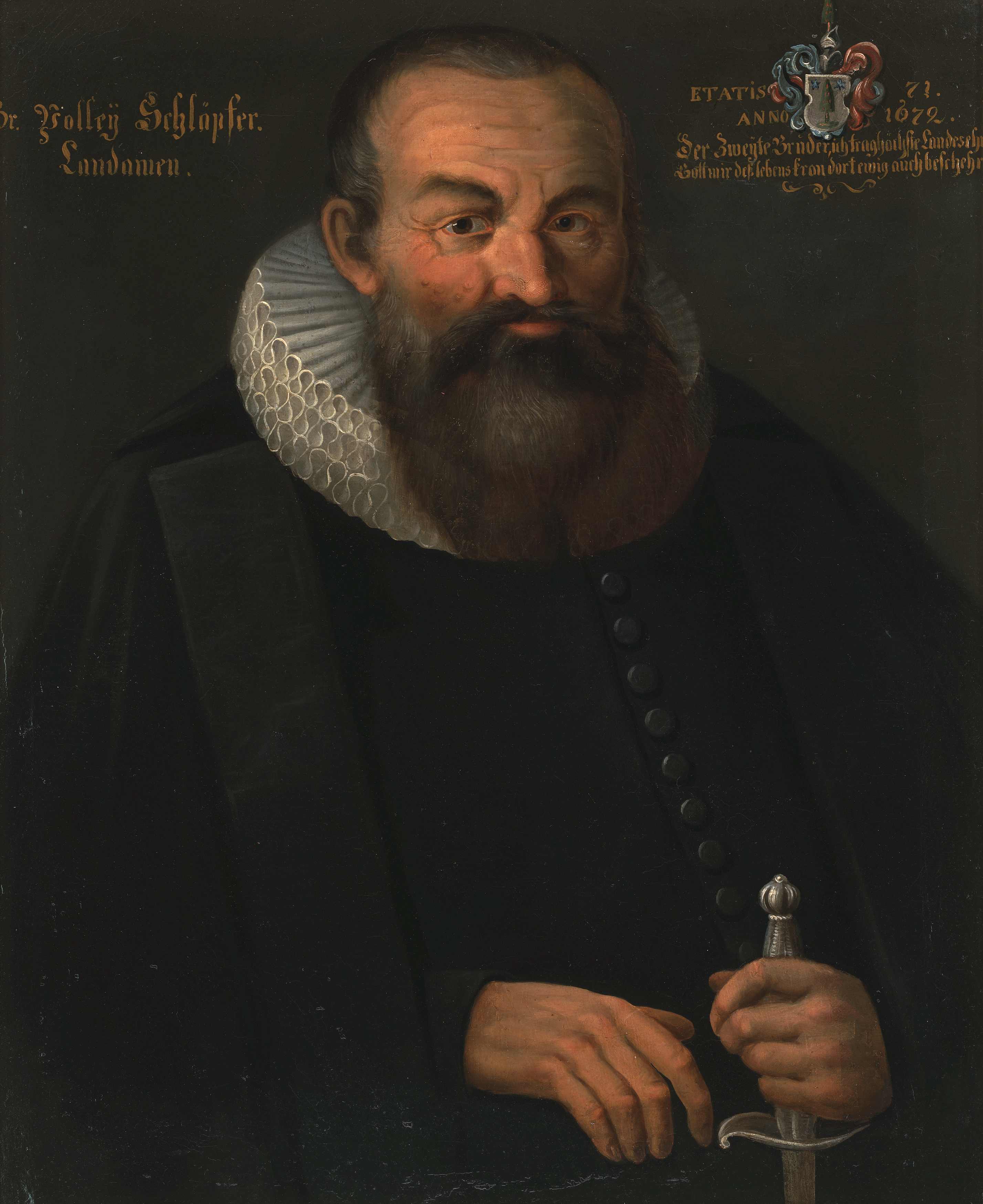 12. Landammann von Appenzell Ausserrhoden, Brustbildnis